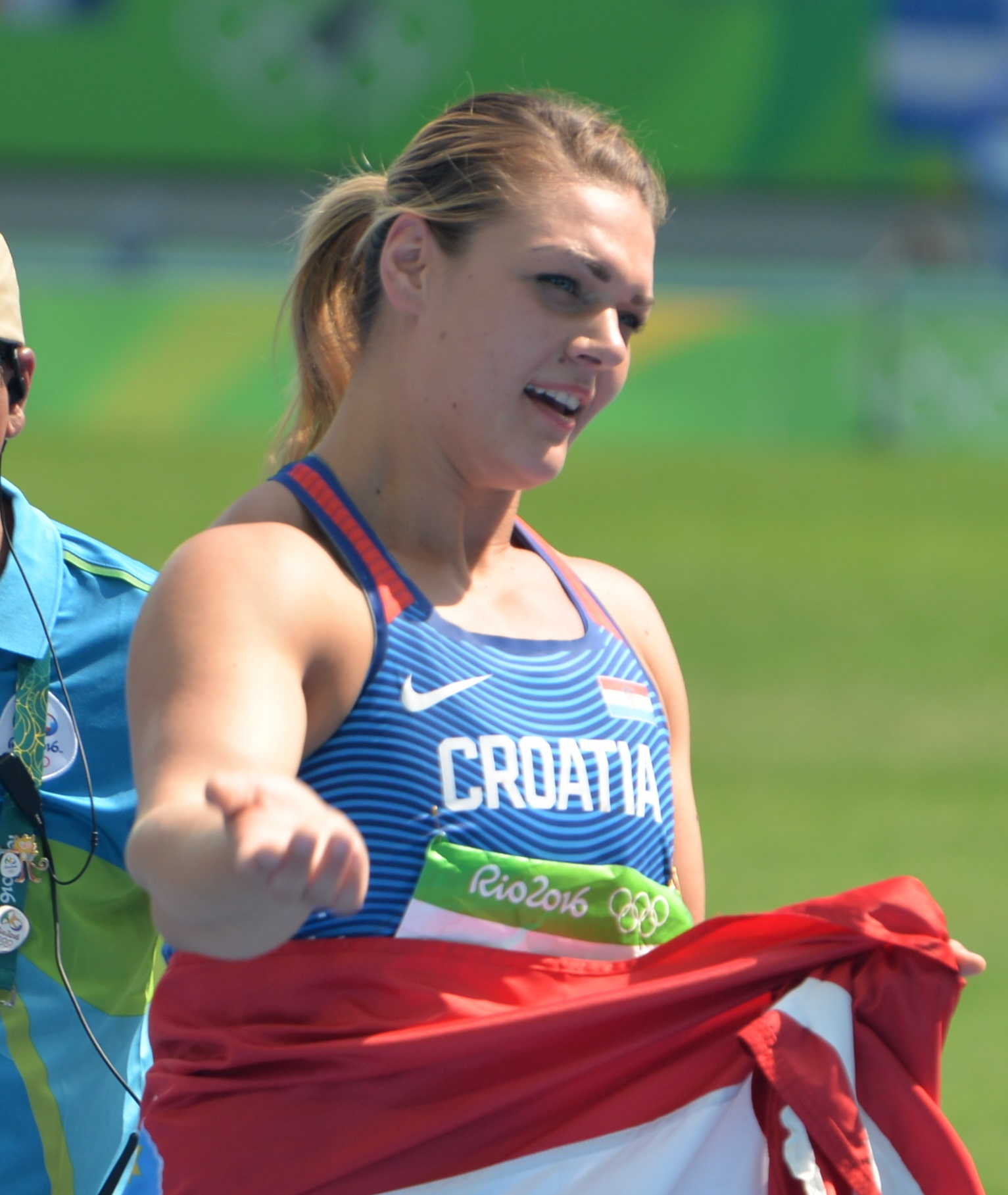 Sandra Perković fêtant sa médaille d'or des JO de Rio 2016